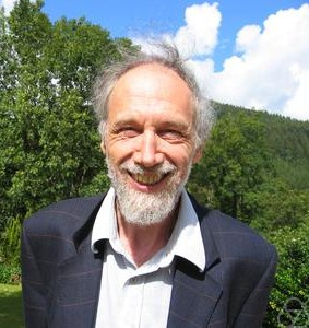 Alain Connes 2004 in Oberwolfach